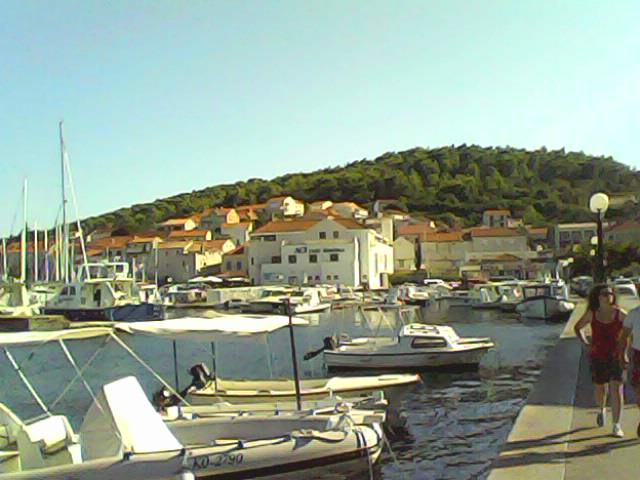 ACI MARINA KORČULA